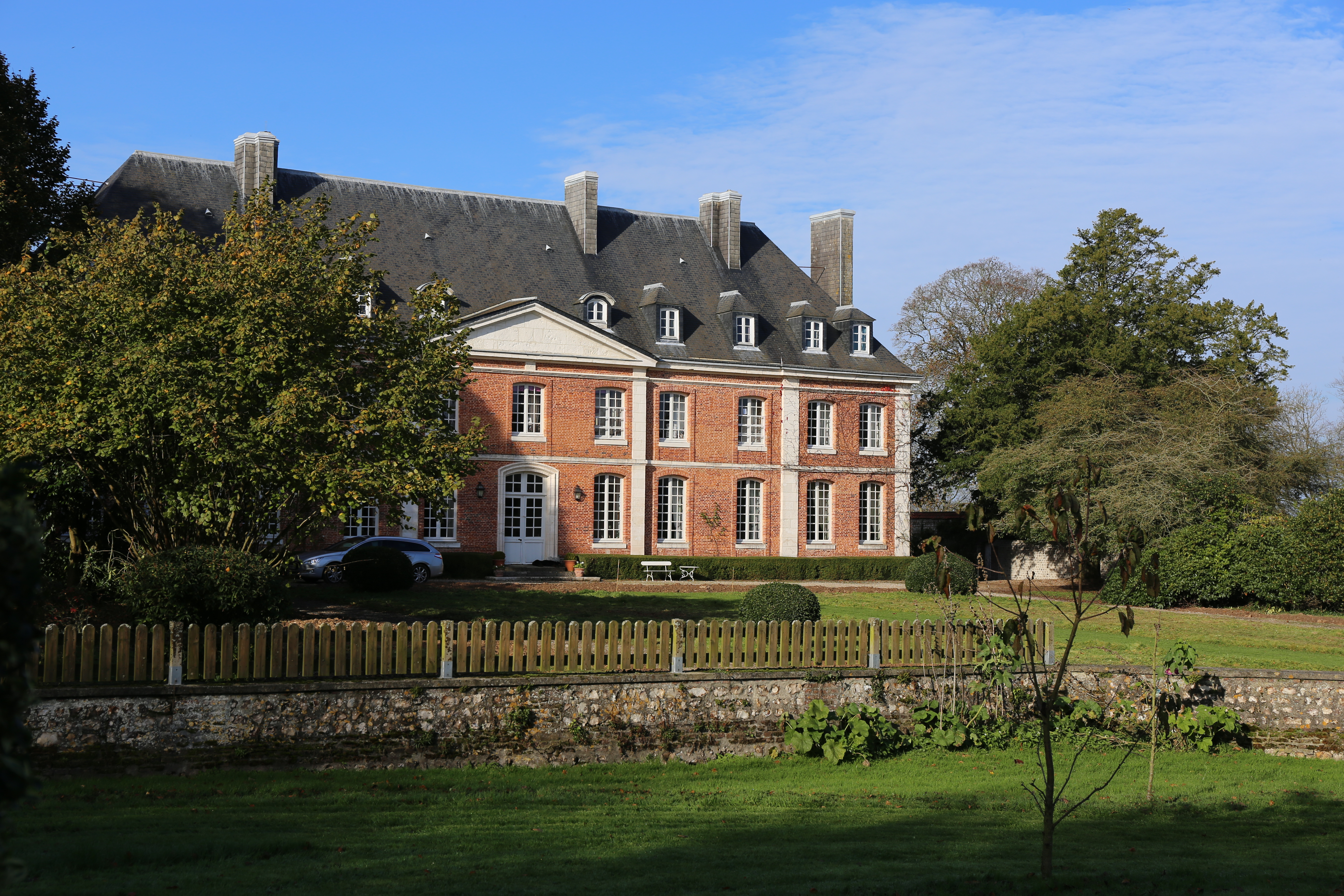 Le château de Cuverville, ancienne propriété d'André Gide.